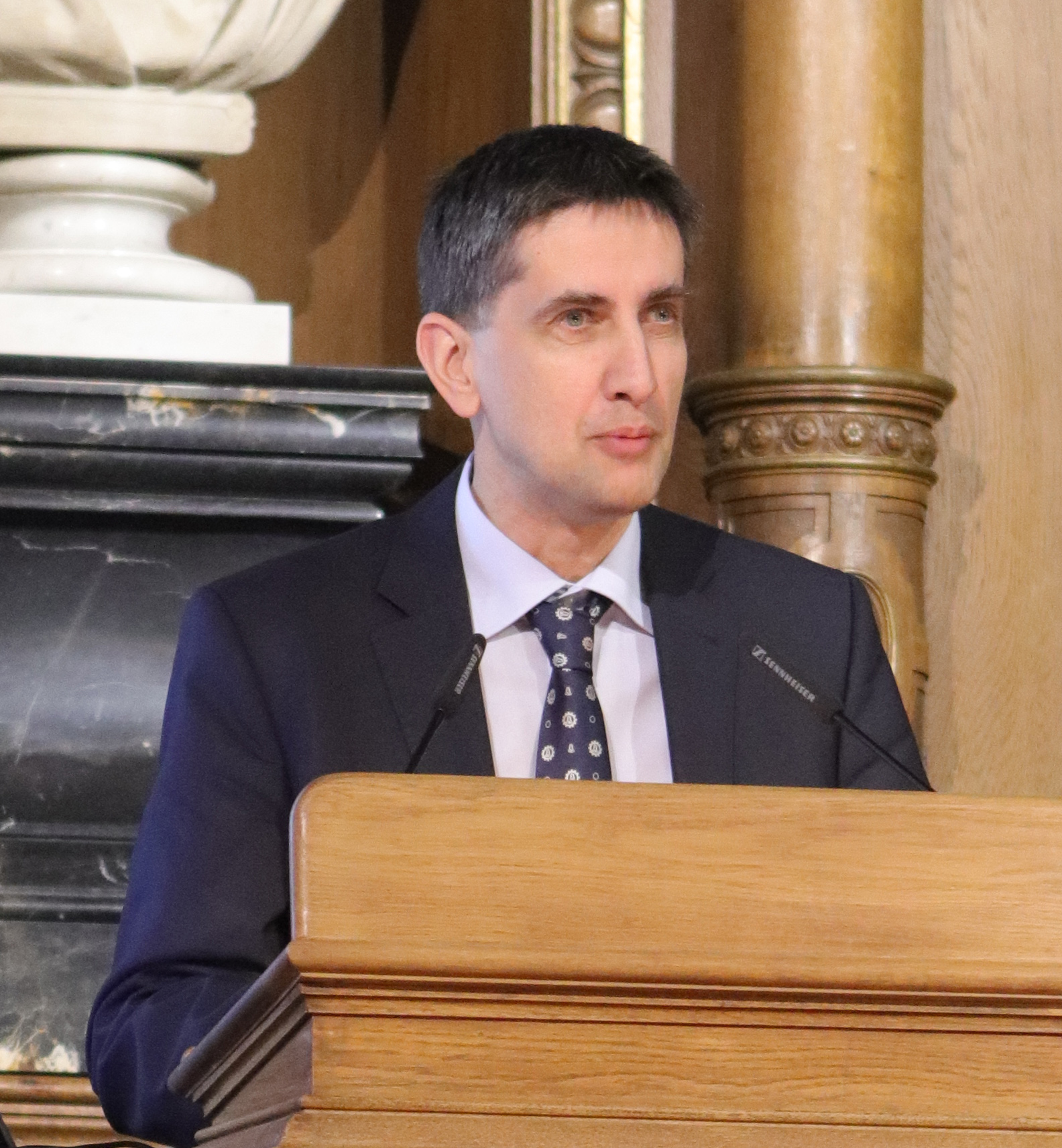 Prof. Dr. Stephen K. Hashmi (Uni Heidelberg) hält die Laudatio im Rahmen der Preisverleihung des Carl-Duisberg-Gedächtnispreises für Prof. Dr. Felix-Raoul Fischer (University of California, Berkeley/USA) auf der Chemiedozententagung am 22. März 2016 in der alten Aula, Ruprecht-Karls-Universität Heidelberg, Grabenstraße 1, 69117 Heidelberg/Deutschland.